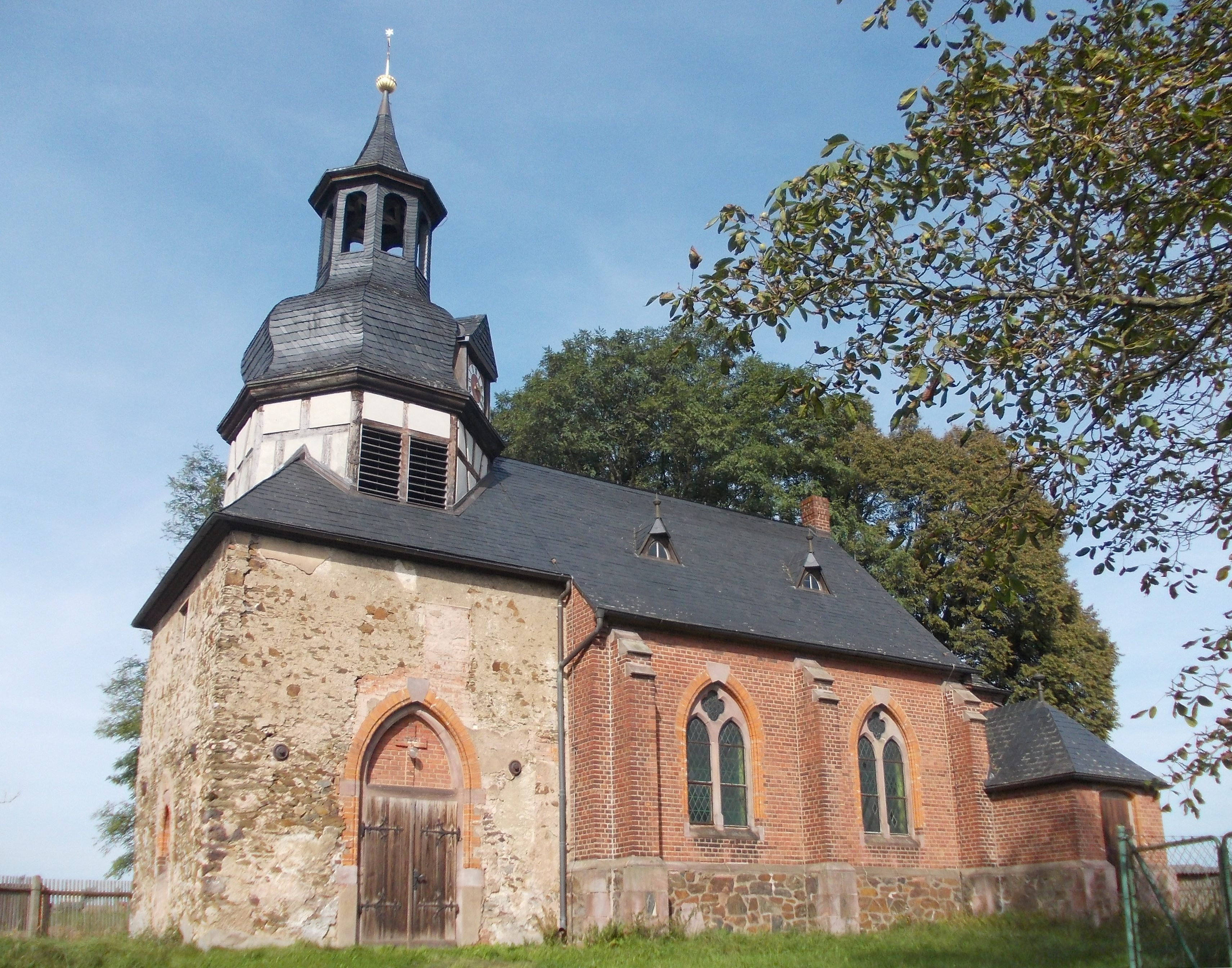 Kirche St. Matthäus in Hermerode (Stadt Mansfeld)